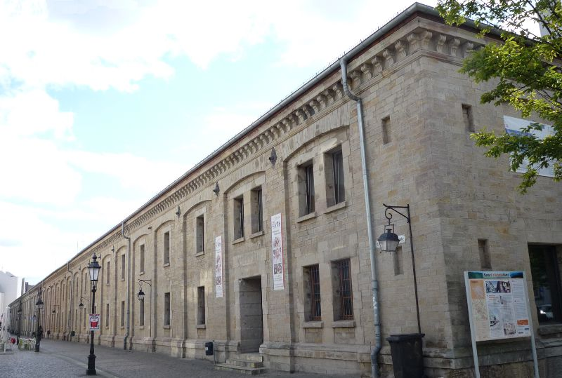 Kaserne VI in Saarlouis (beherbergt heute Städt. Museum, Stadtbücherei und Polizei; ehemals Unterkunft des Infanterie-Regiments "Graf Werder")